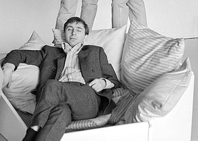 Stephan Gip i sin fåtölj P-stolen gjord av Perstorpsplattor.